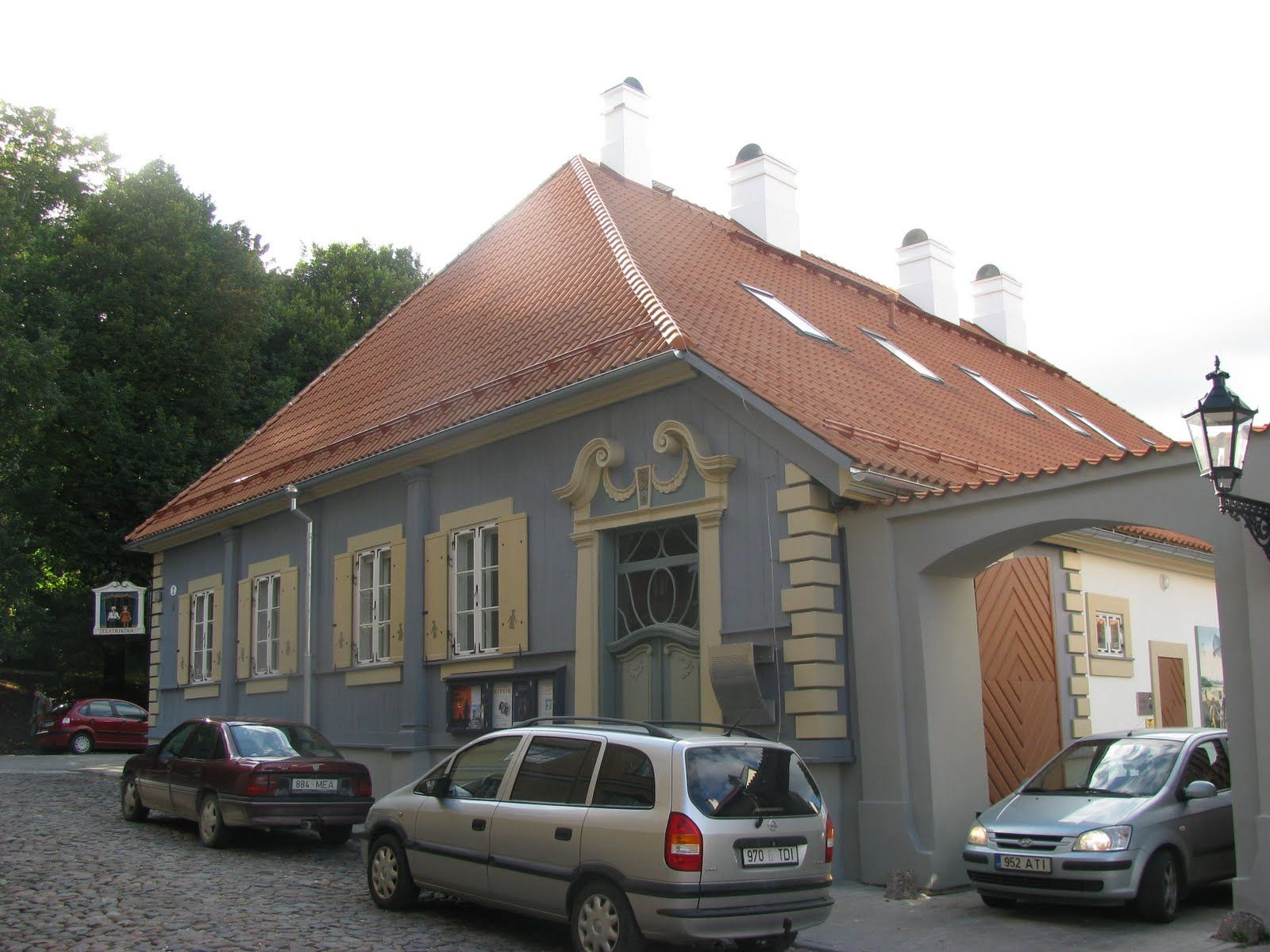 Elamu Tartus Lutsu 2, 18.saj.